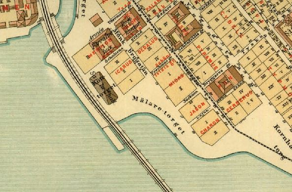 Del av Lundgrens karta över Stockholm år 1885 visande kvarteren Daedalus, Icarus, Midas, Jason, Charon m.fl.